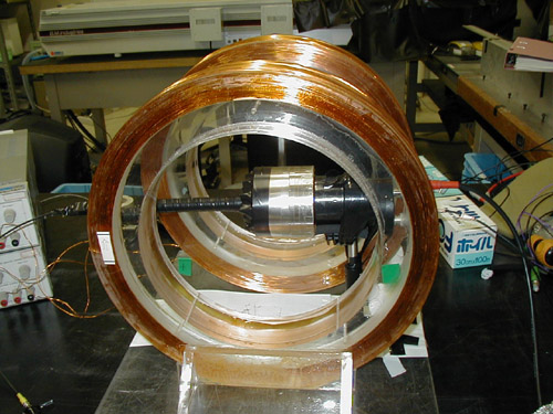 Helmholtz coil